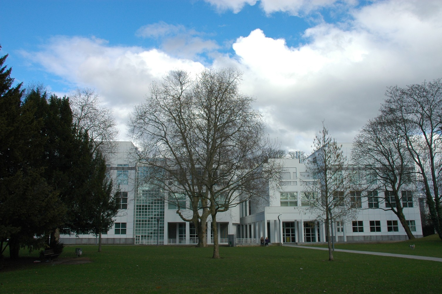 中文（中国大陆）: 德国法兰克福 应用艺术博物馆